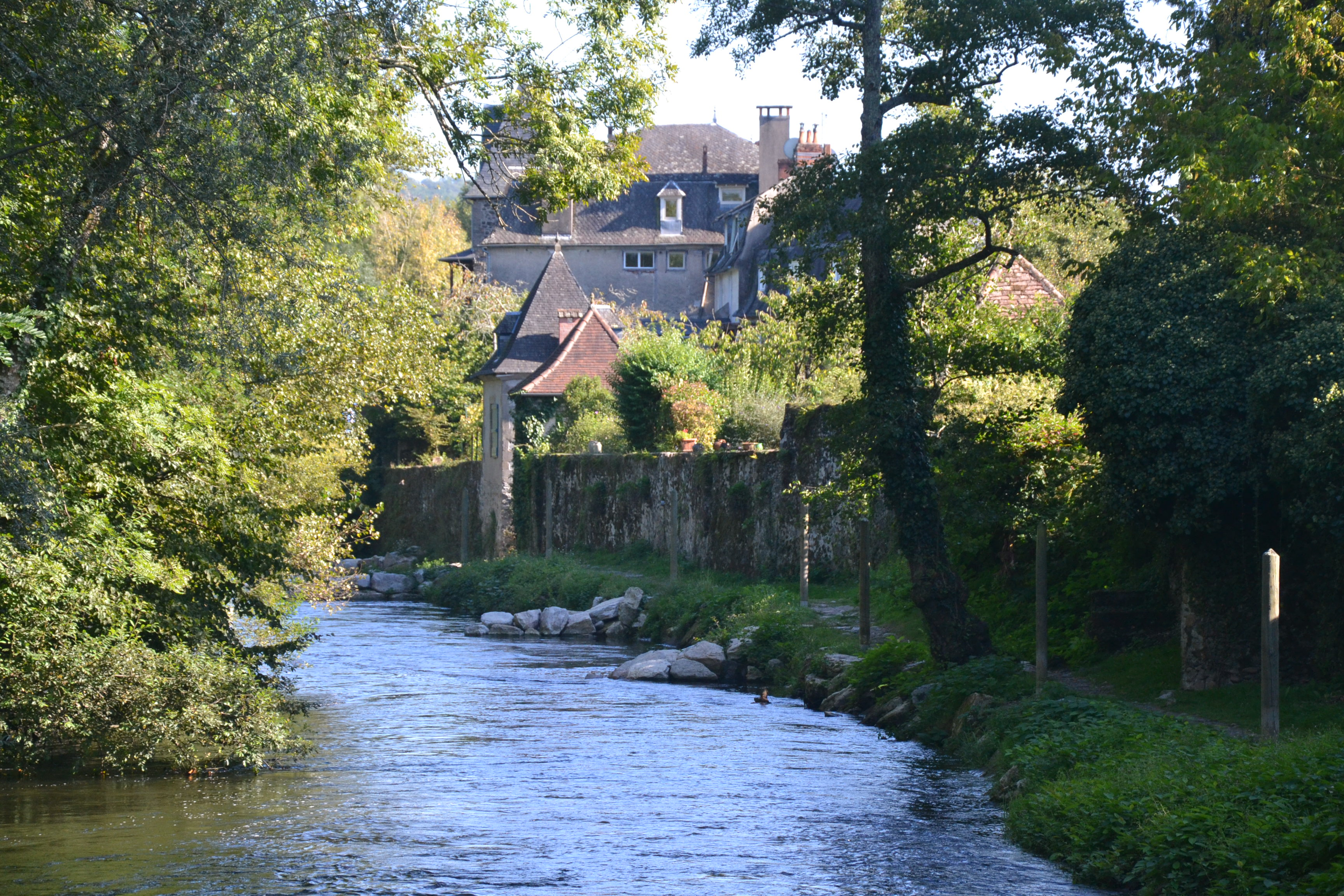 Les rives d'un bras de la Dordogne, à Beaulieu-sur-Dordogne (Corrèze, France).